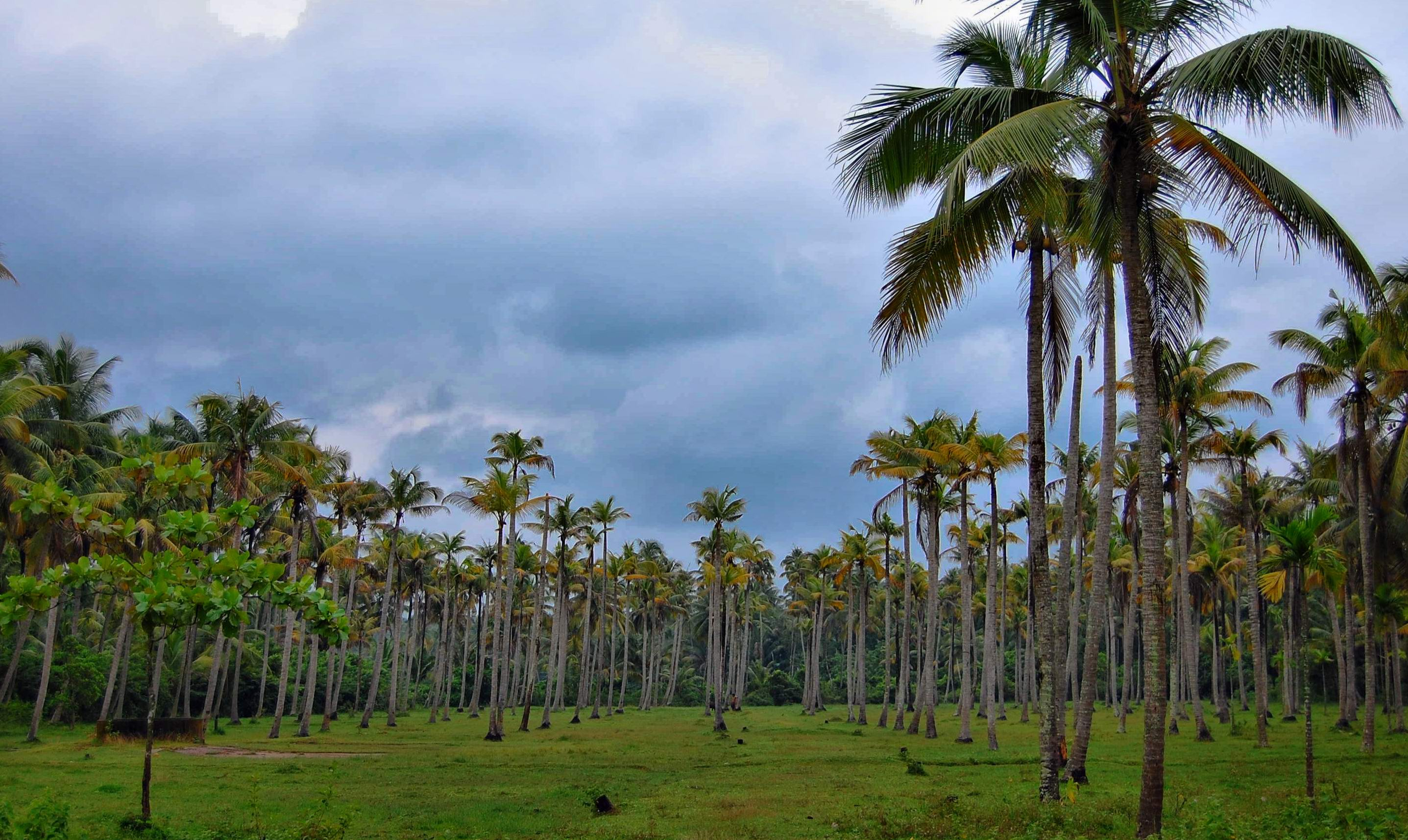 Coconut_farm